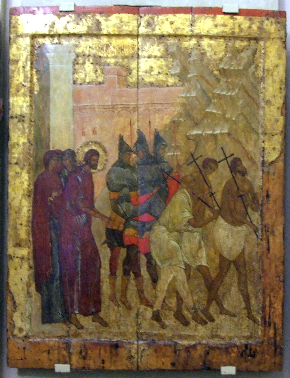 Ведение Христа на Голгофу. Около 1497 (?), ростовская школа (?) Из Успенского собора Кирилло-Белозерского монастыря